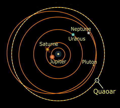 Orbite de Quaoar